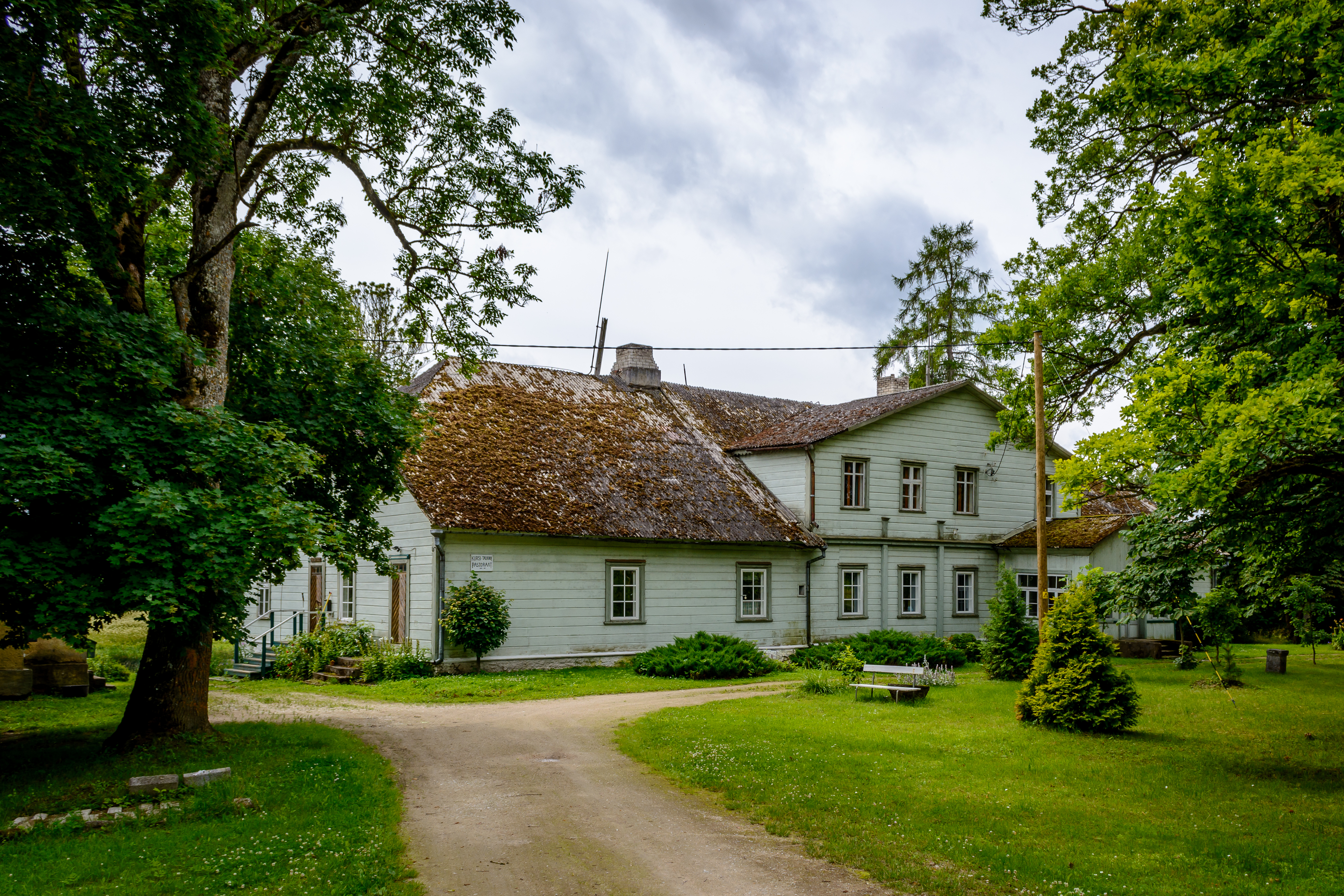 Kursi pastoraadi peahoone